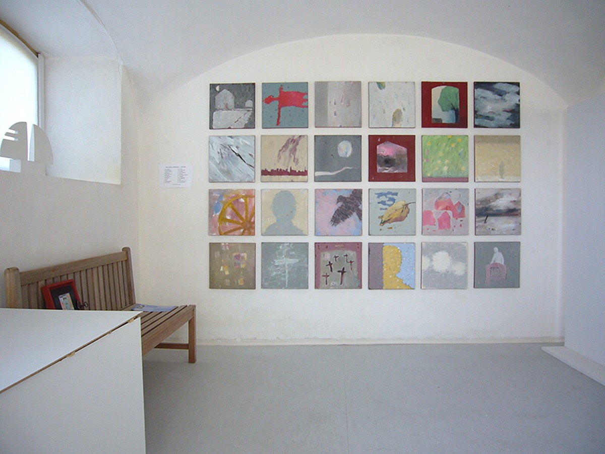 Rainer Devens: Bilderreihe Winterreise mit 24 Gemälden nach Franz Schuberts gleichnamigen Liederzyklus